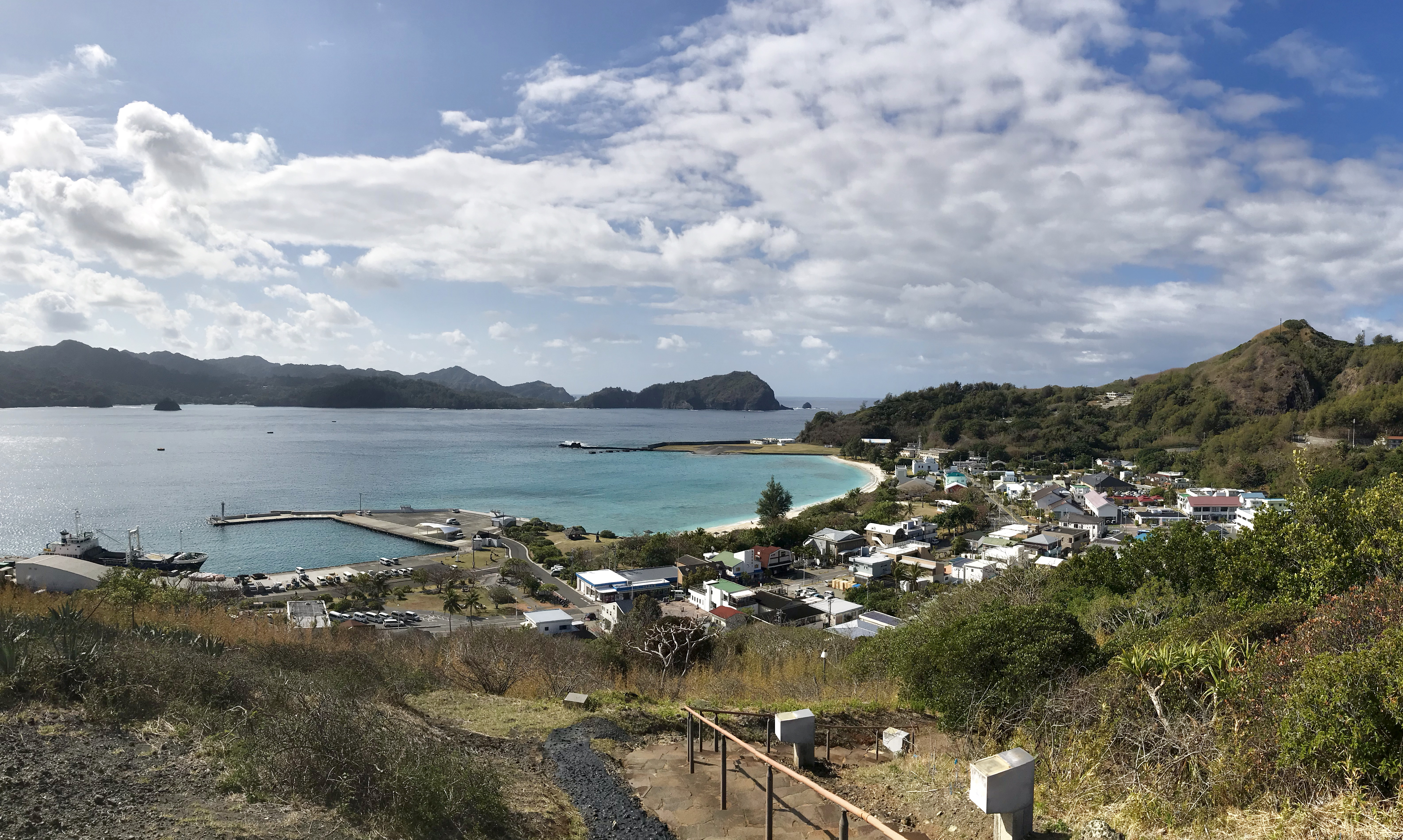 東京都小笠原村父島大村地区